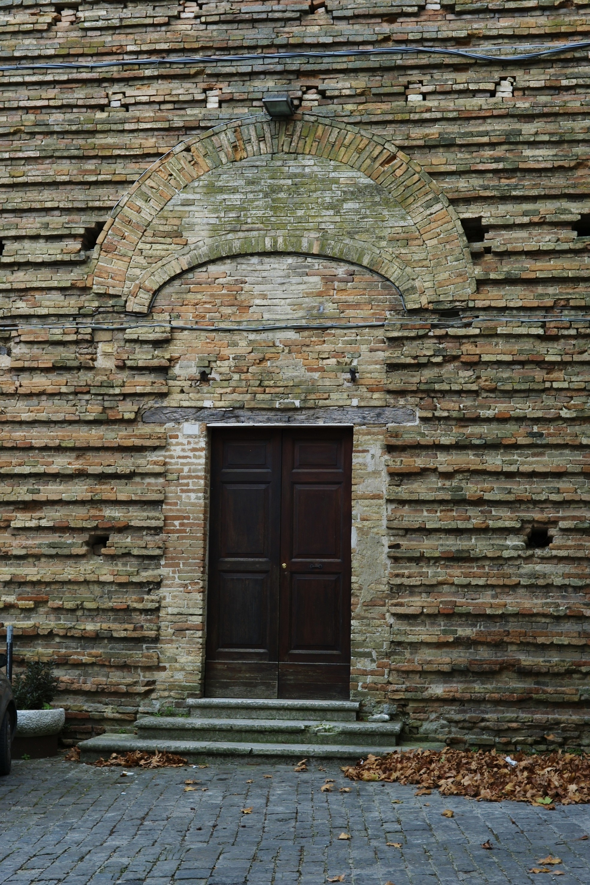 La porta d'ingresso alla chiesa della Santissima Annunziata intra muros in Urbino